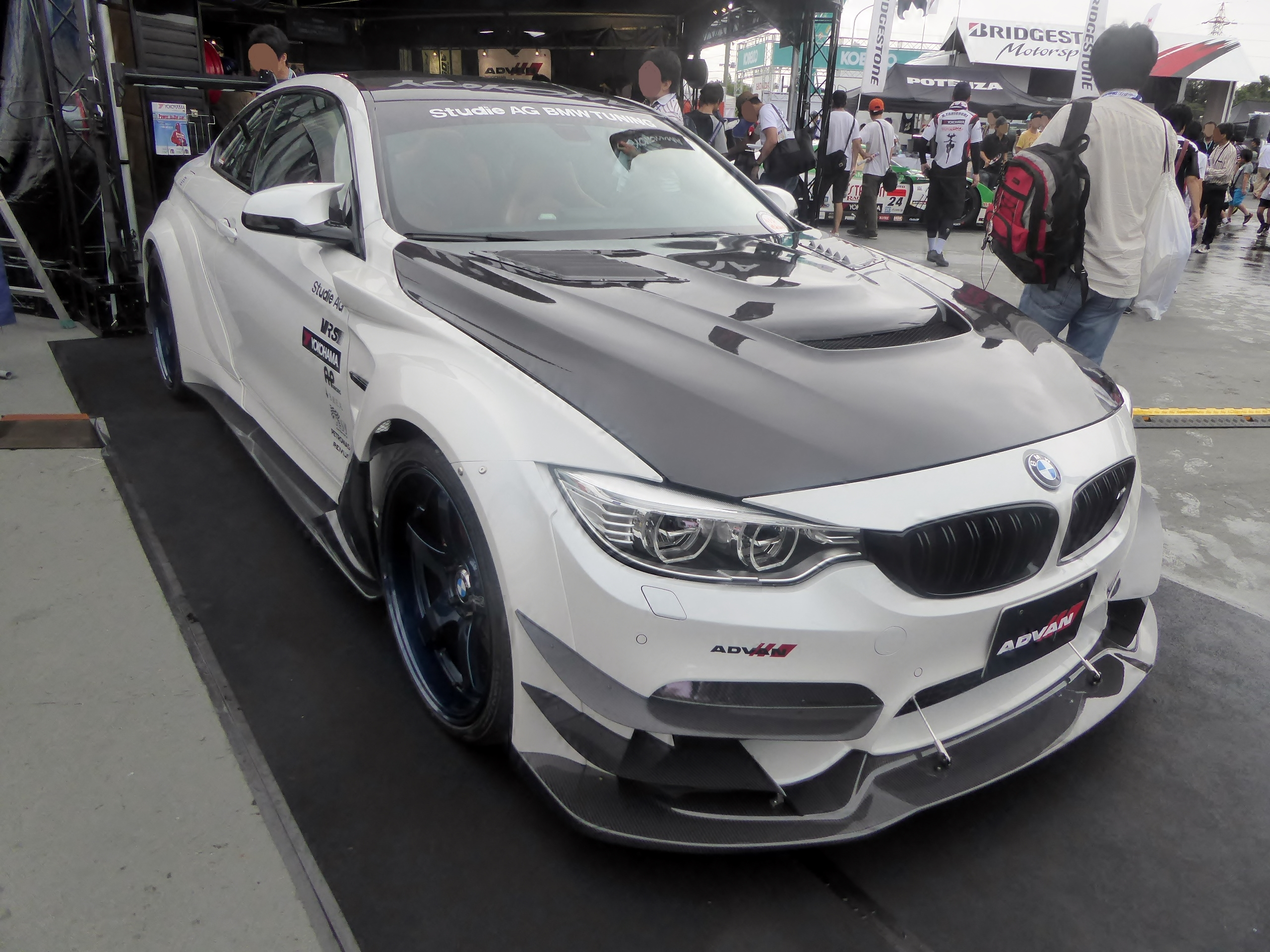 studie AGがチューニングしたF82型BMW・M4をフロントから撮影。